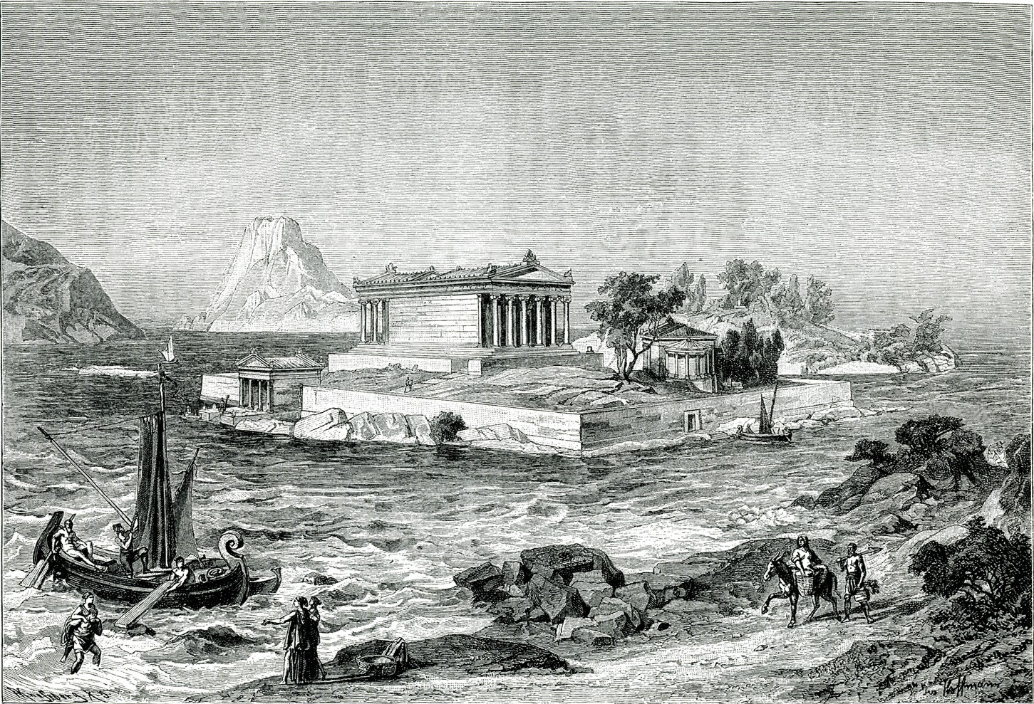 Ιάκωβος Φάλκε. Ελλάς, ο Βίος των Αρχαίων Ελλήνων. Κατά το γερμανικό του Ιακώβου Φάλκε, Ν. Γ. Πολίτης (μετ.), Αθήνα, Κάρολος Βίλμπεργκ, 1887